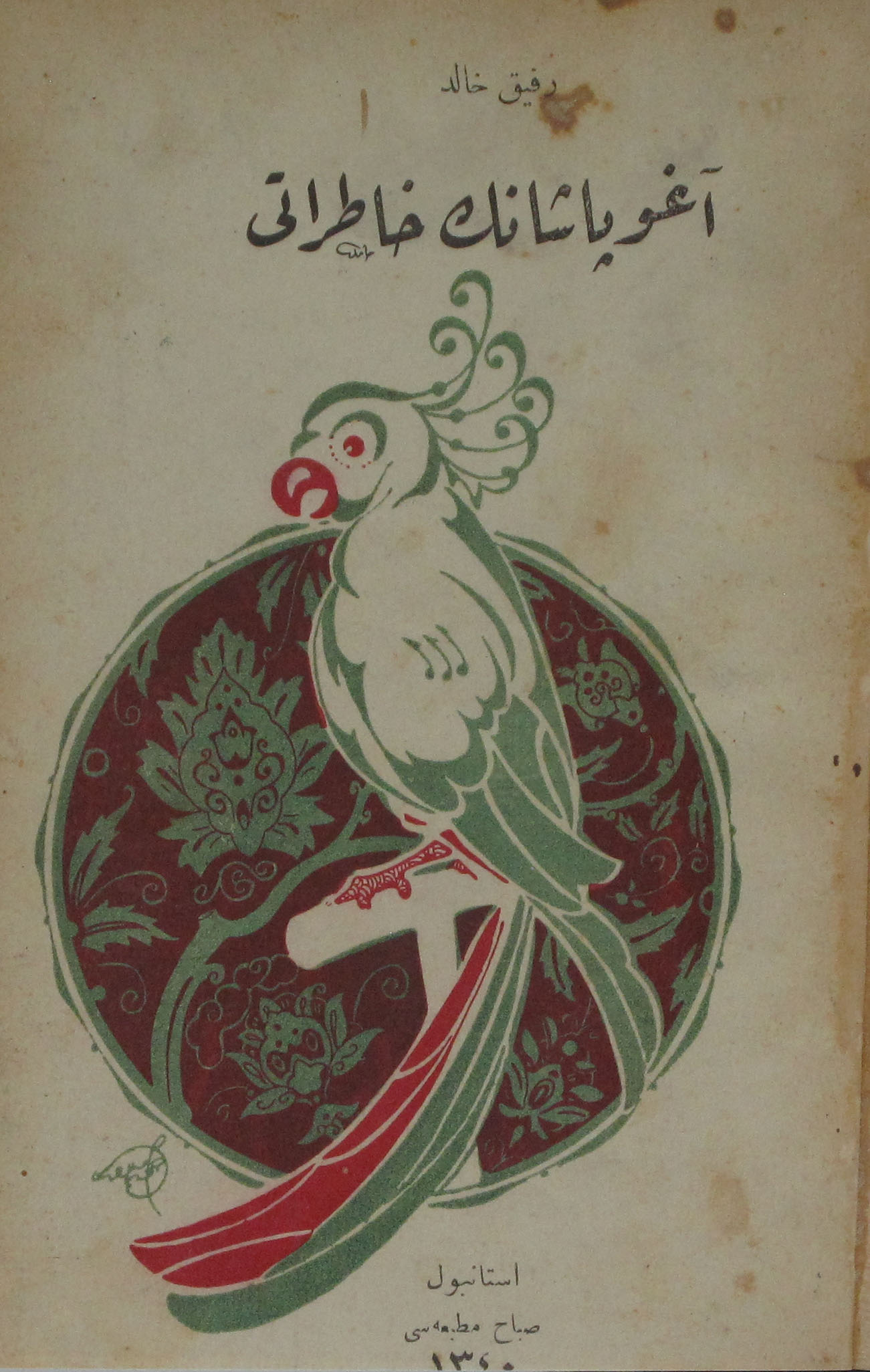 Ago Paşa’nın hatıratı [آغو پشانك خاطراتى] / [Karay], Refik Halid [قاراى]، رفيق خالد]Yayın Bilgisi : İstanbul : Sabah Matbaası, 1338 R/1922 Fiziksel Nitelik : 160 s.; 19x12 cm.